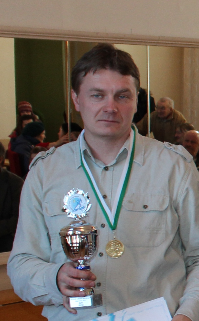 Urmo Ilves Eesti valdade 20. talimängude kabeturniiri võitjana Kiili valla võisttkonnas